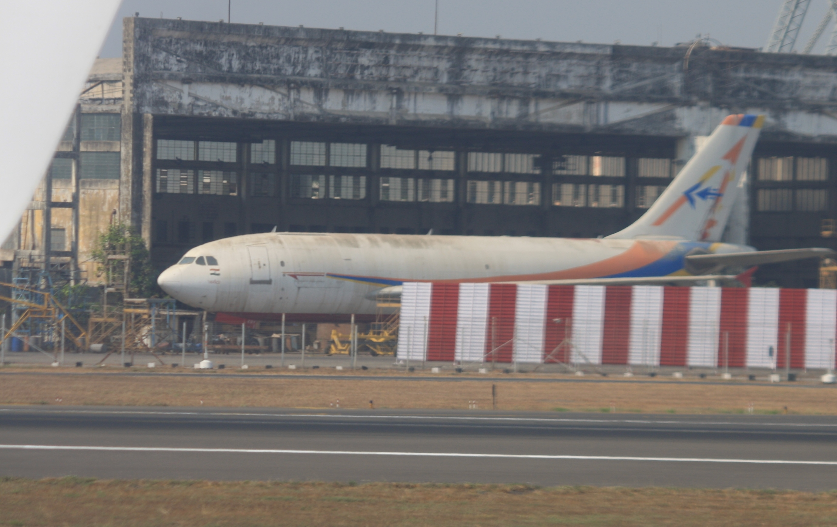 Mumbai (Bombay) - Chhatrapati Shivaji International (Sahar / Santa Cruz) (BOM / VABB) India, April 16 2014.